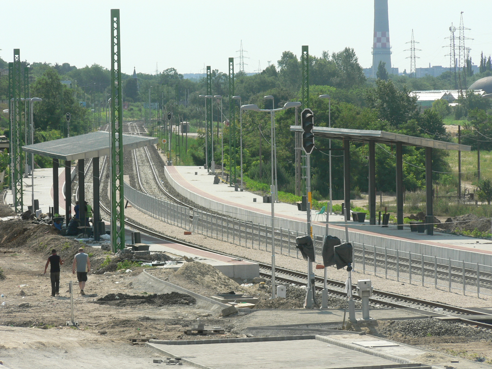 Az ürömi vasútállomás látképe a 2014-15-ös felújítás előtti átadás előtt